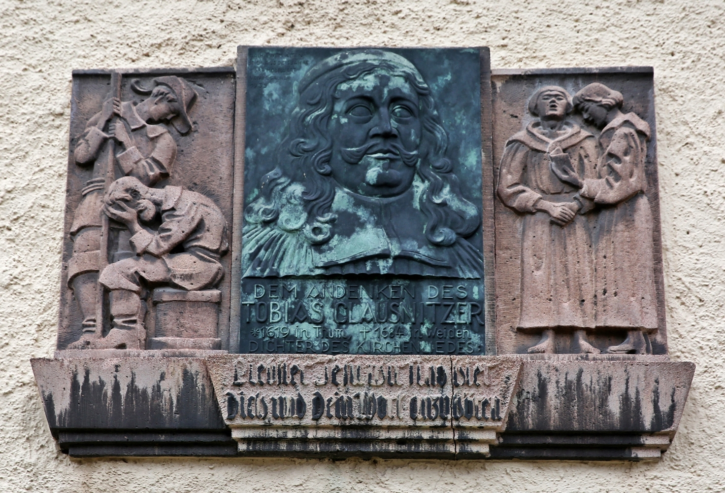 Thum: Gedenktafel für Tobias Clausnitzer (1619-1684) an der Außenwand der Stadtkirche St. Annen.